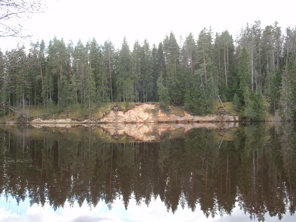 Madal pae